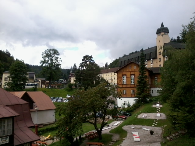 Pohled do centra